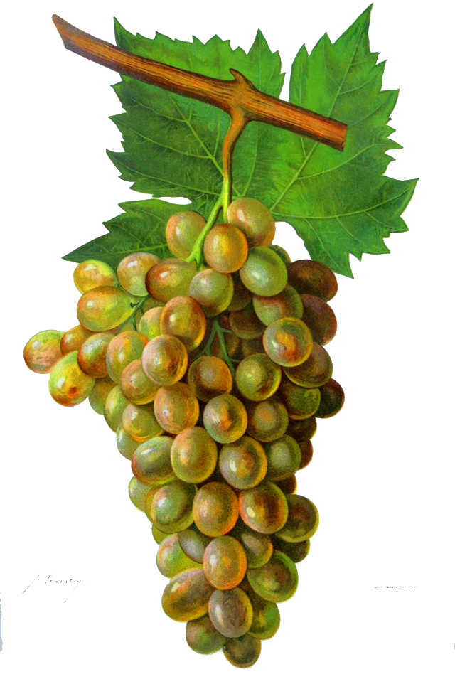 Grappe de Bicane par Viala et Vermorel